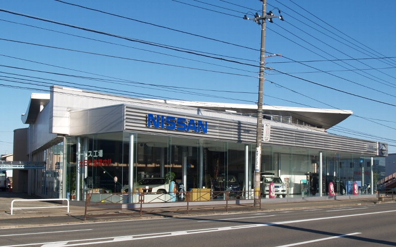 秋田日産自動車ラ・カージュ店（秋田市八橋鯲沼町、秋田県道56号秋田天王線沿い）